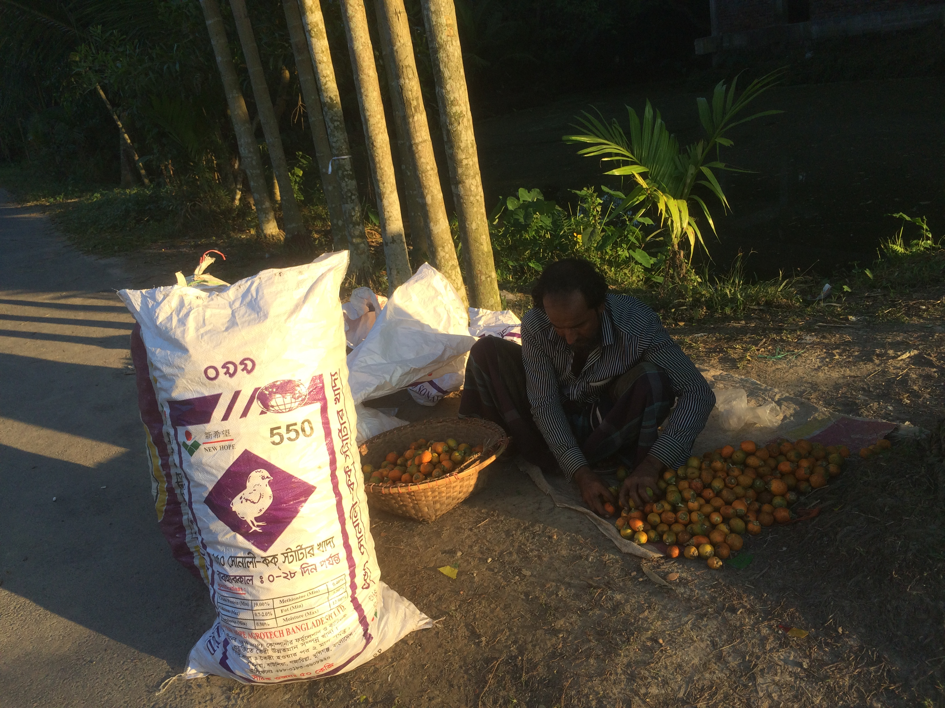 রোকনপুর গ্রামের সুপারি বিক্রেতা